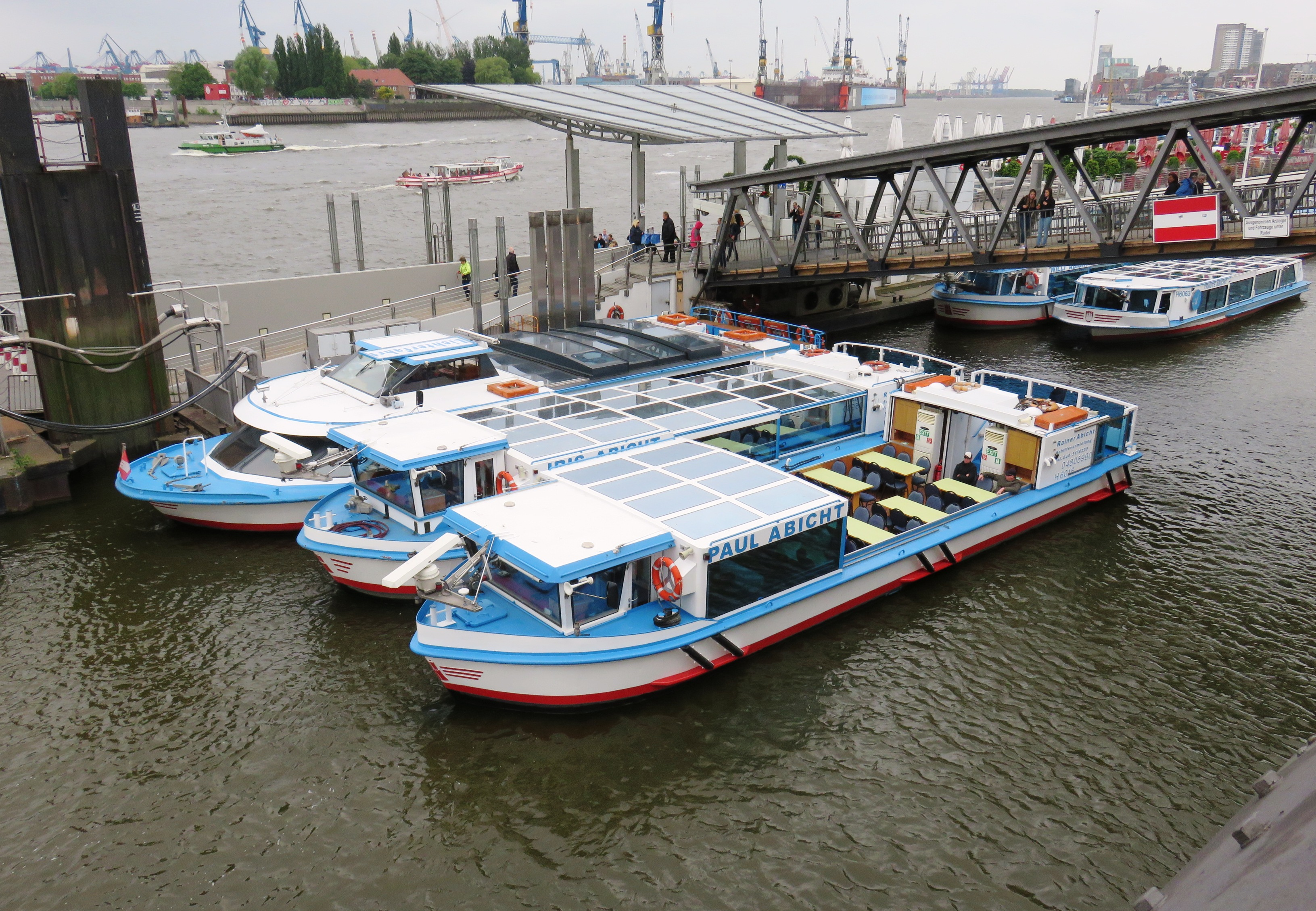 Einige Barkassen der Rainer Abicht Elbreederei an den St. Pauli-Landungsbrücken